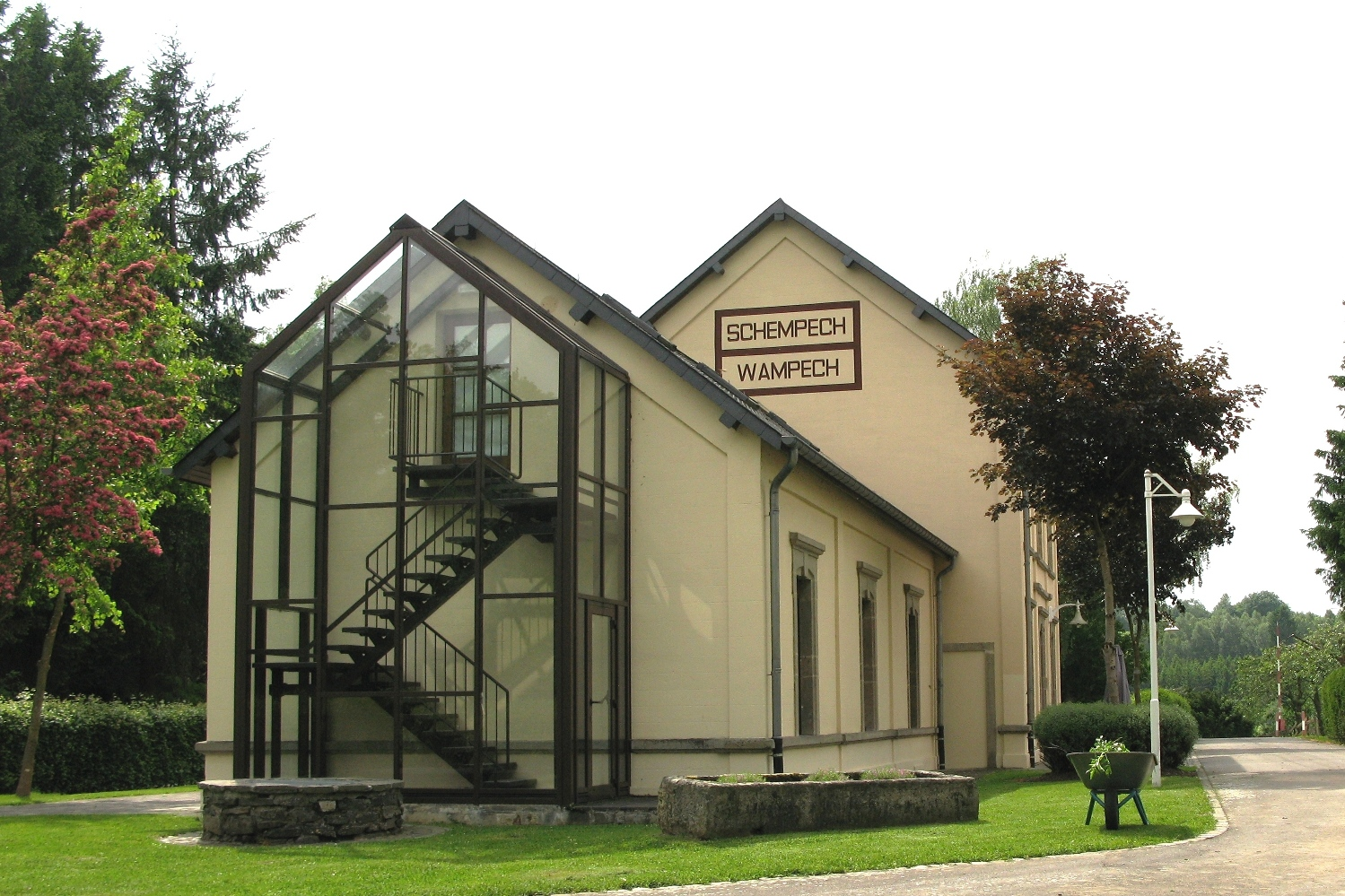 D'Gare Schëmpech-Wampech vun hanne gesinn am Mee 2008.